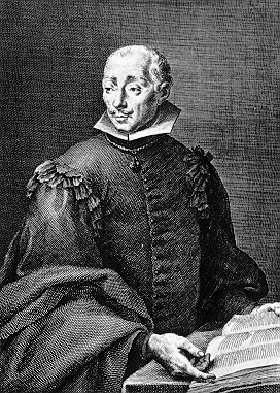 Francisco Vallés (1524-1592), médico personal de Felipe II.